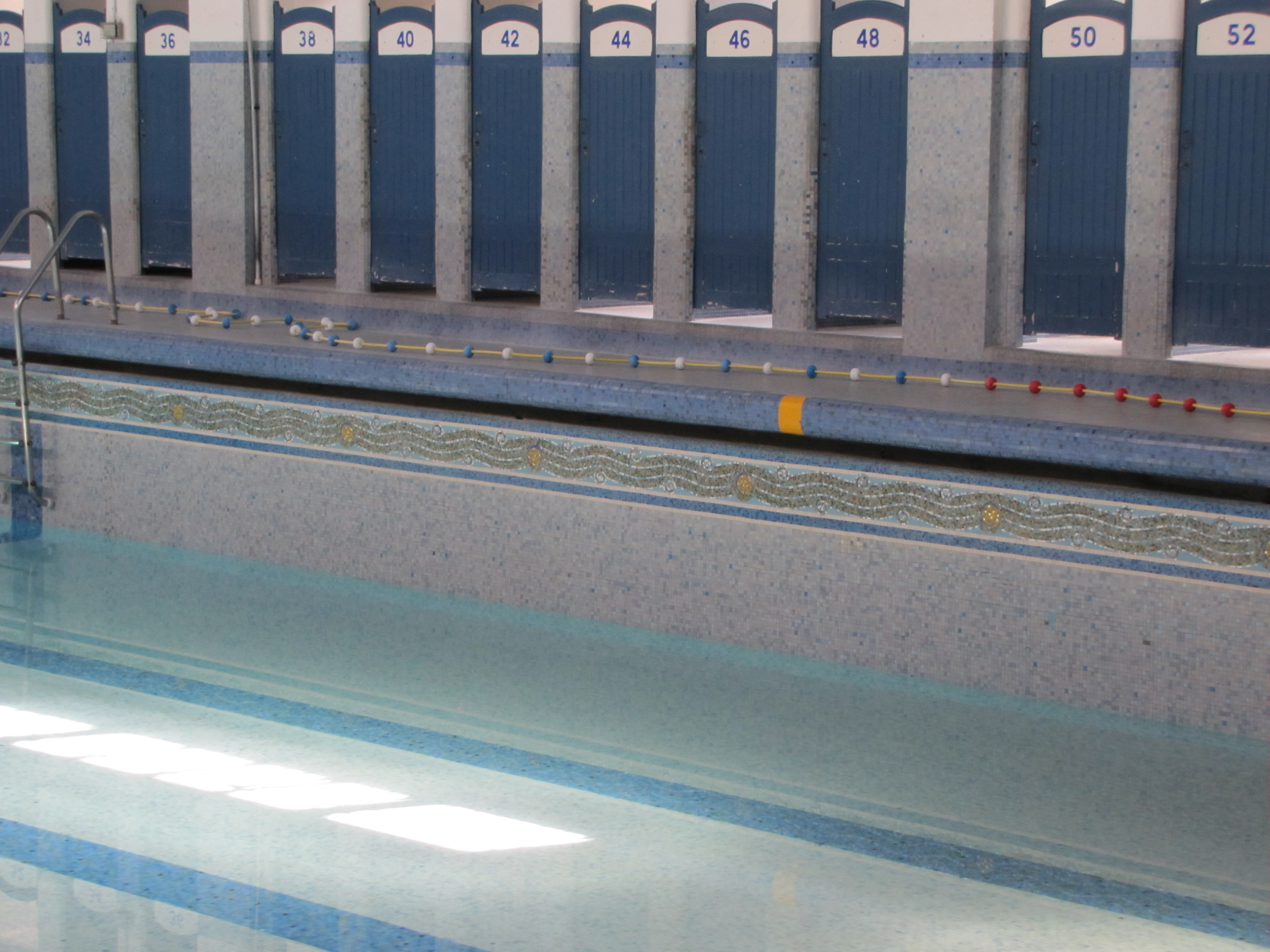 Frise restaurée avec des tesselles Odorico originales qui avaient été conservées.